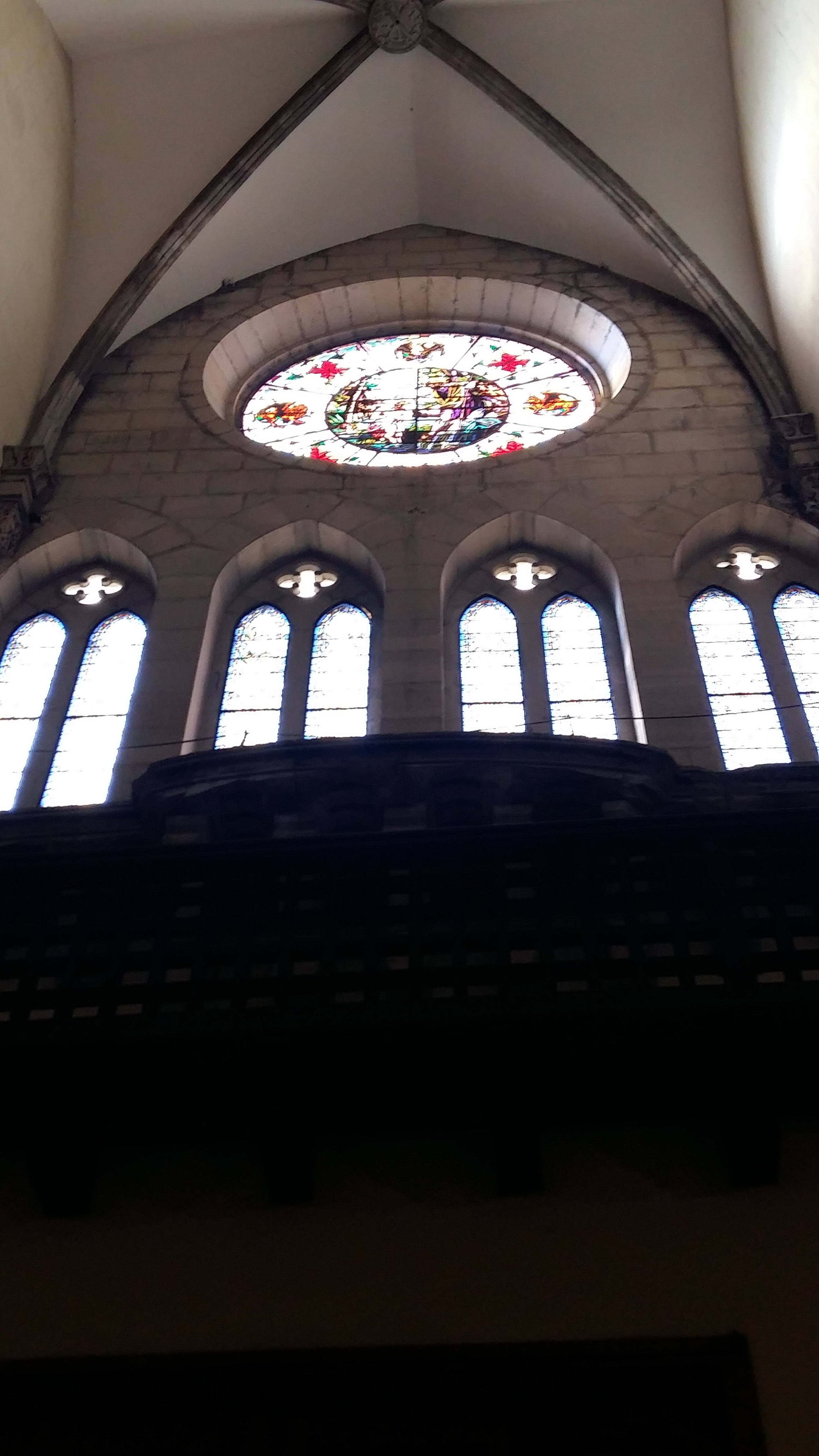 Vitrall interiror Sant Joan